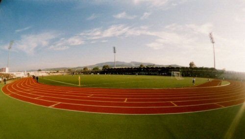 Stade Souidani Boujemaa, Guelma (Algeria)